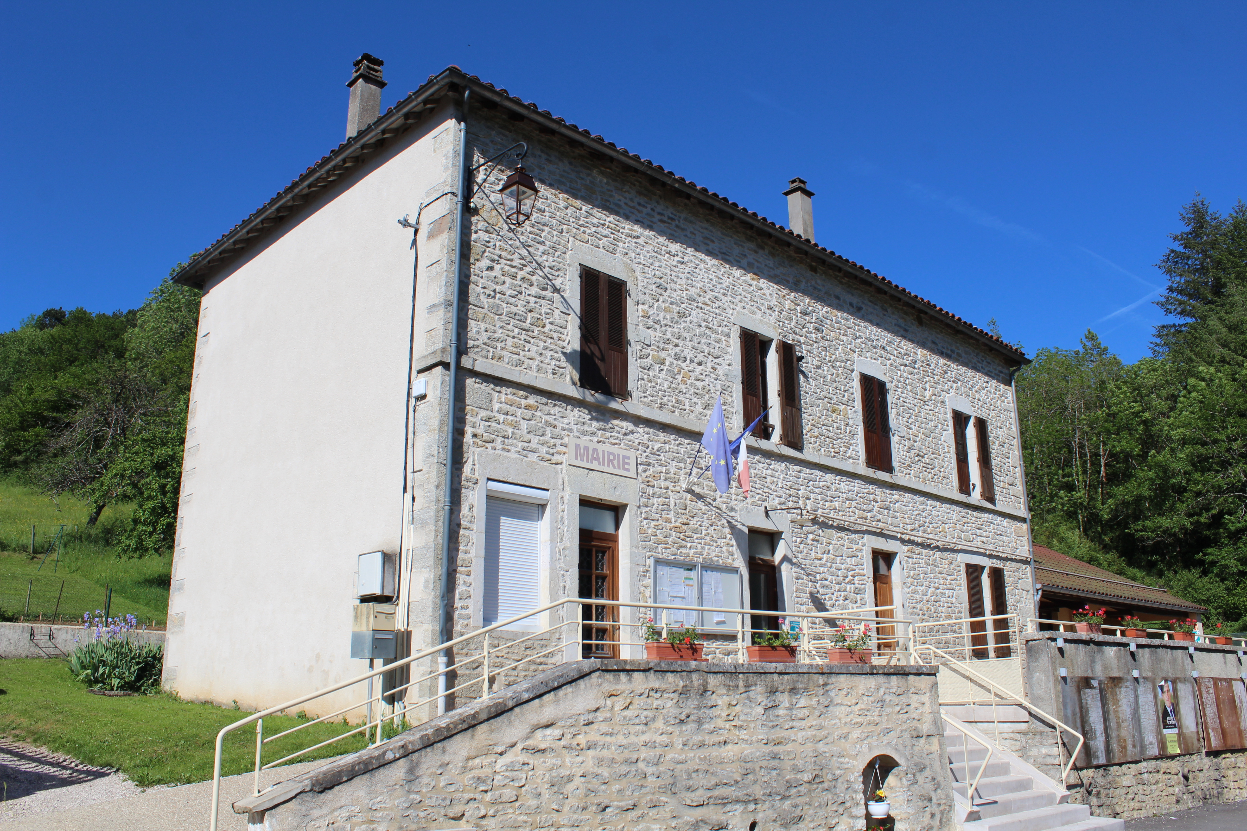 Mairie de Germagnat, actuellement mairie annexe de la commune nouvelle de Nivigne-et-Suran.